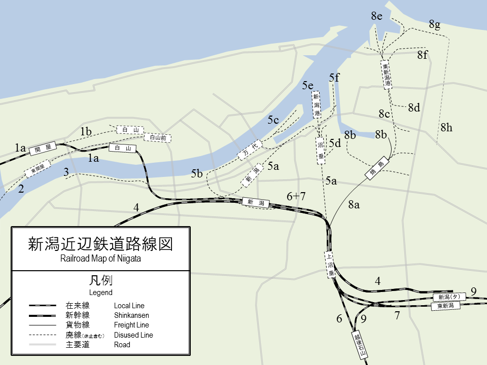 新潟近辺の鉄道路線図。 1a JR越後線 1b 国鉄越後線(1927年まで越後鉄道)、1951年12月に廃止。旧白山駅は現在の市立鏡淵小学校付近。 2 新潟交通電車線。東関屋～白山前(旧県庁前)は1992年4月に、全線は1999年4月に廃止。 3 日本軽金属の専用線。1982年頃に廃止。 4 上越新幹線。1982年11月開通。 5a 旧信越本線・信越貨物支線。2010年3月廃止。新潟～上沼垂の直通ルートが完成する前(1940年代、ただし旅客は1958年から)までは5aが主要ルートであった。 旧新潟駅は現在の流作場五差路～弁天公園付近。 5b 新潟～万代に通じる貨物線。最西端は現在の南万代小学校付近。1960年頃までに廃止。 5c 万代貨物駅から万代島に伸びる貨物線。上空写真から石炭などを積替えしていたことが確認できる。 5d 日本石油などの専用線。 5e 中央埠頭の貨物線。1942年～1986年。新潟港駅に通じており、いわゆるボート・トレインの一種として戦時下運行されていた。 5f 北埠頭の貨物線。運用時期は不明だが、5e同様とみられる。 6 JR信越本線。新潟～旧上沼垂間は7(JR白新線)と併走。 7 JR白新線。 8a 信越貨物支線、通称「臨港貨物線」。焼島までは2012年現在貨物輸送あり。 8b 北越製紙の専用線。北側の専用線はコンテナ専用、2008年開通。 8c 信越貨物支線焼島～東新潟港間。2012年現在休止。踏切などは撤去されている。東新潟港駅は1924年に山ノ下貨物駅として開業、1928年に現在の名称に改称。 8d 旧新潟鐵工の専用線。 8e 新潟港の各埠頭に通じる貨物線群。なお図中にはすべての路線を表示していない。現在は未使用、一部撤去。 8f 旧農林省・食糧庁の倉庫に通じる貨物線。 8g 昭和石油の専用線。1940年頃開通。 8h 米軍が1945年に作成した地図に「REPORTED」と記されている路線。ただ1946年に撮影された上空写真では確認できない。 実在したかは不明の路線ではあるが、1941年7月24日に東新潟港から1.7kmの地点に大形貨物駅が開業、同年9月1日に国有化された際に廃止されている。 大形貨物駅は河渡新田に存在したとされており、米軍が作成した地図のルート(本図同様)よりは新潟空港寄り、つまり東側に位置していたと考えられる。 9 JR貨物の連絡線。 説明は停車場変遷大事典、米軍上空写真(1946年撮影、国土変遷アーカイブより)、国土地理院地形図など参考とした。